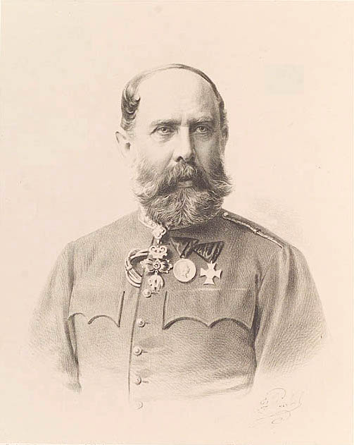 Karl Ludwig von Österreich (1833-1896)